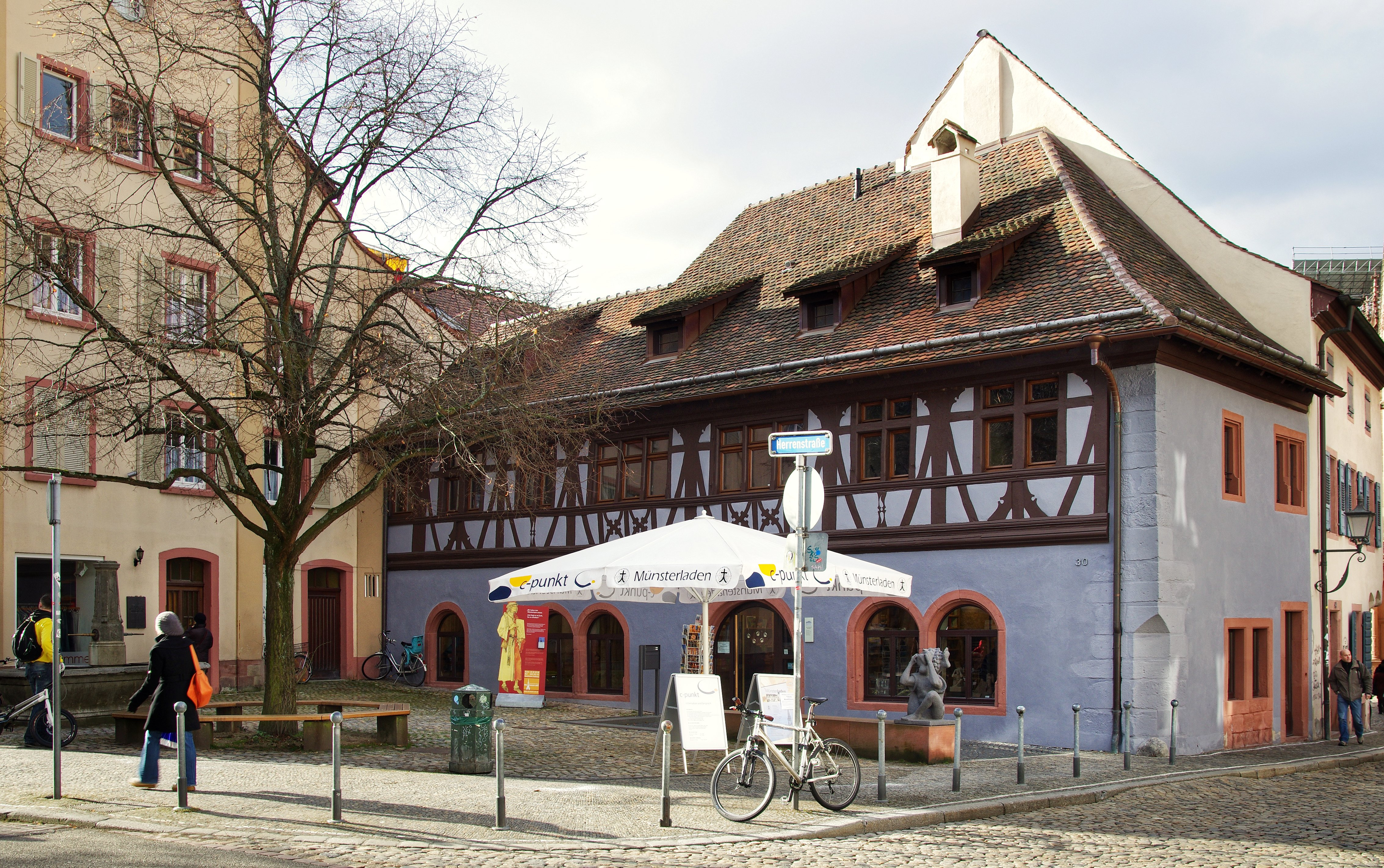 Die Alte Münsterbauhütte in Freiburg